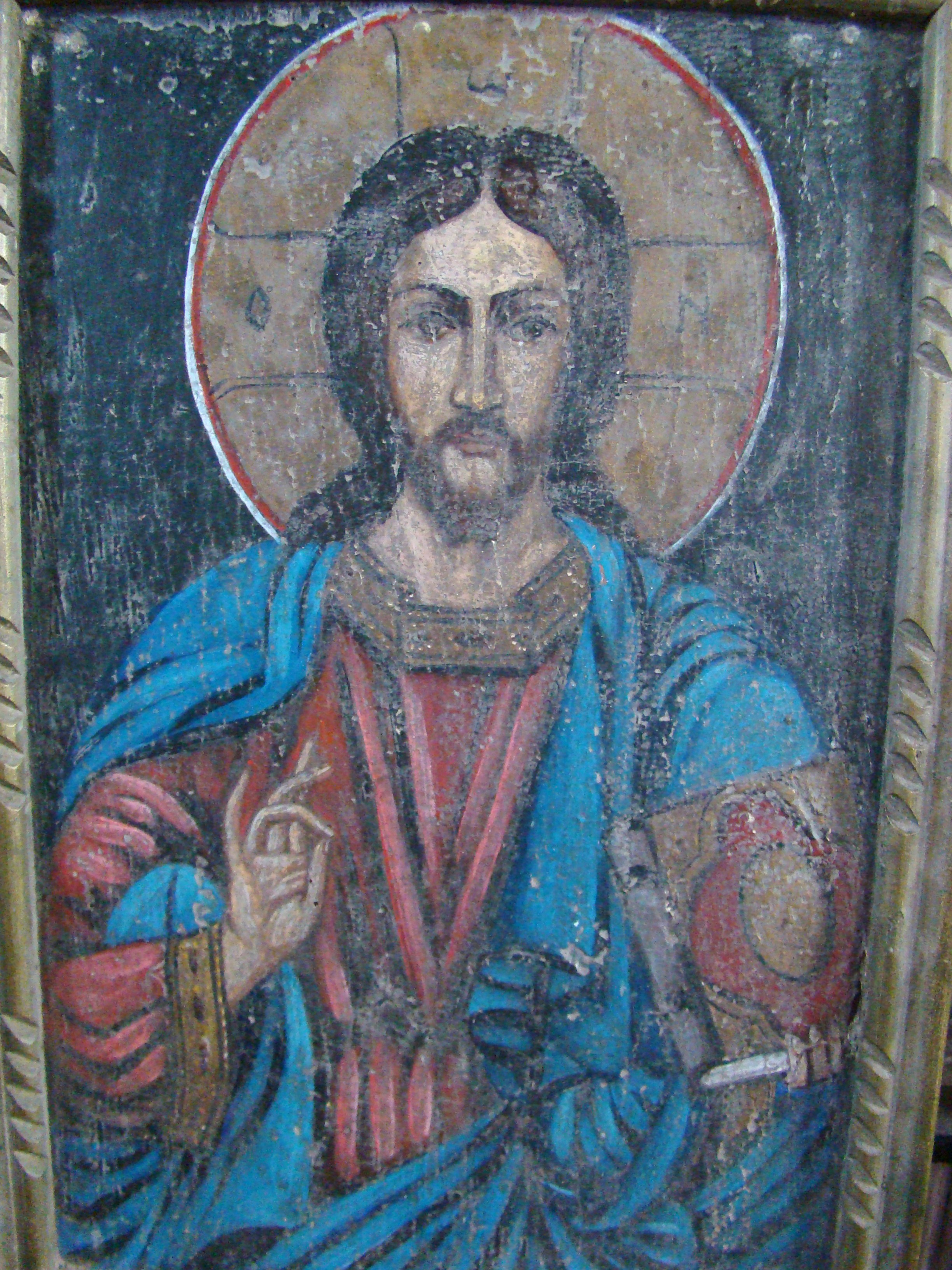 Biserica „Sfântul Ierarh Nicolae”, sat OBÂRŞA; comuna TOMEŞTI